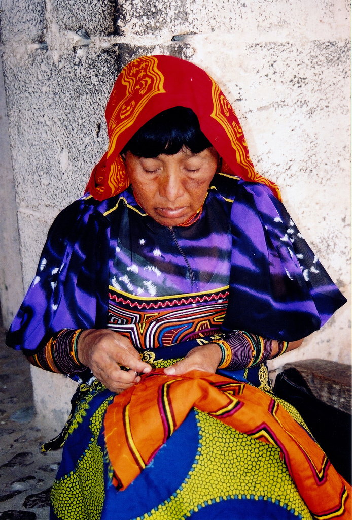 Kuna woman sewing in Panama.